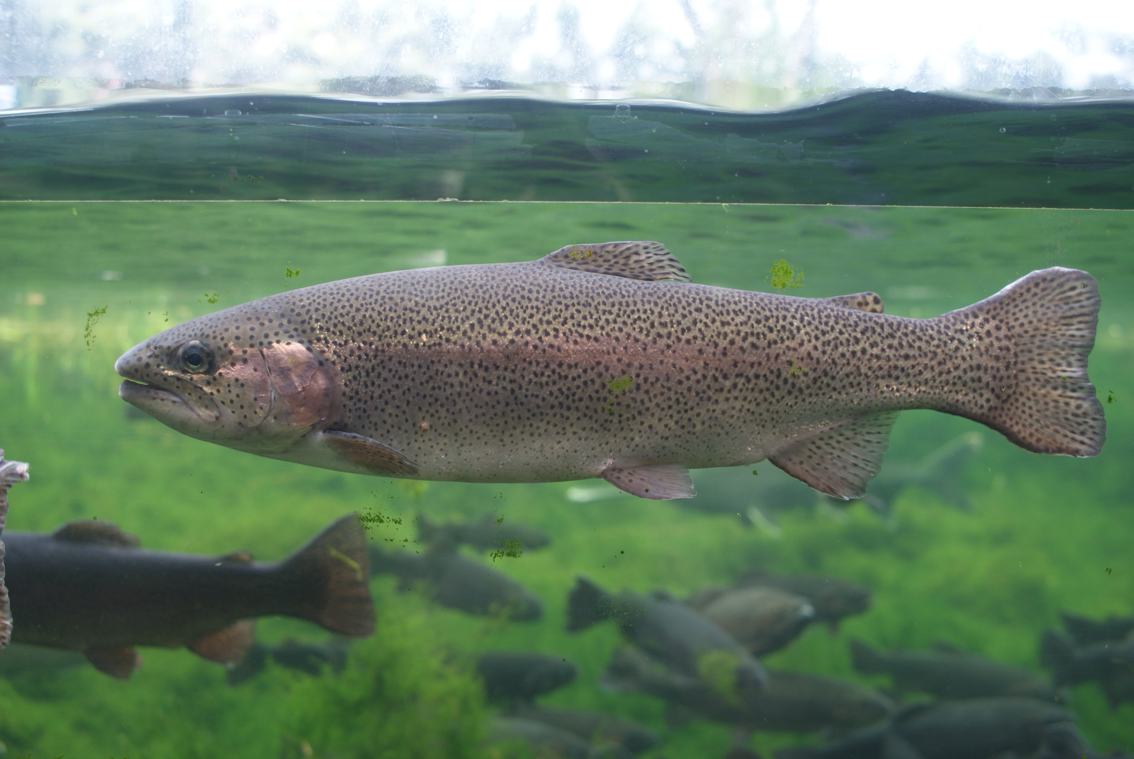 Oncorhynchus mykiss у Будапешцкім Акеанарыуме